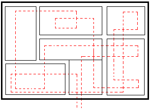 Diagram_Spaghetti_przyklad